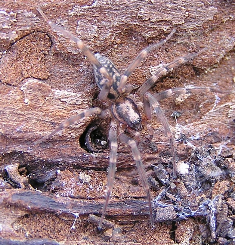 Liocranum rupicola in einem Mischwald bei Hambach (Pfalz, Deutschland).